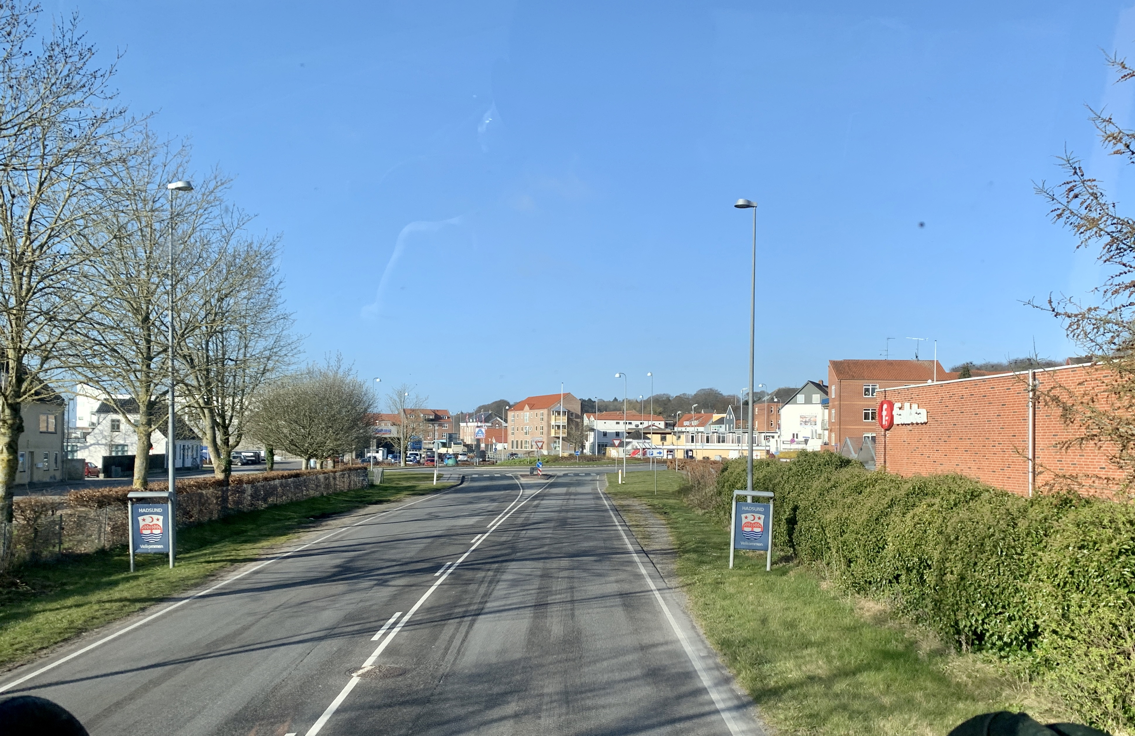 Hadsund Nord Stationsområde set mod vest i 2020